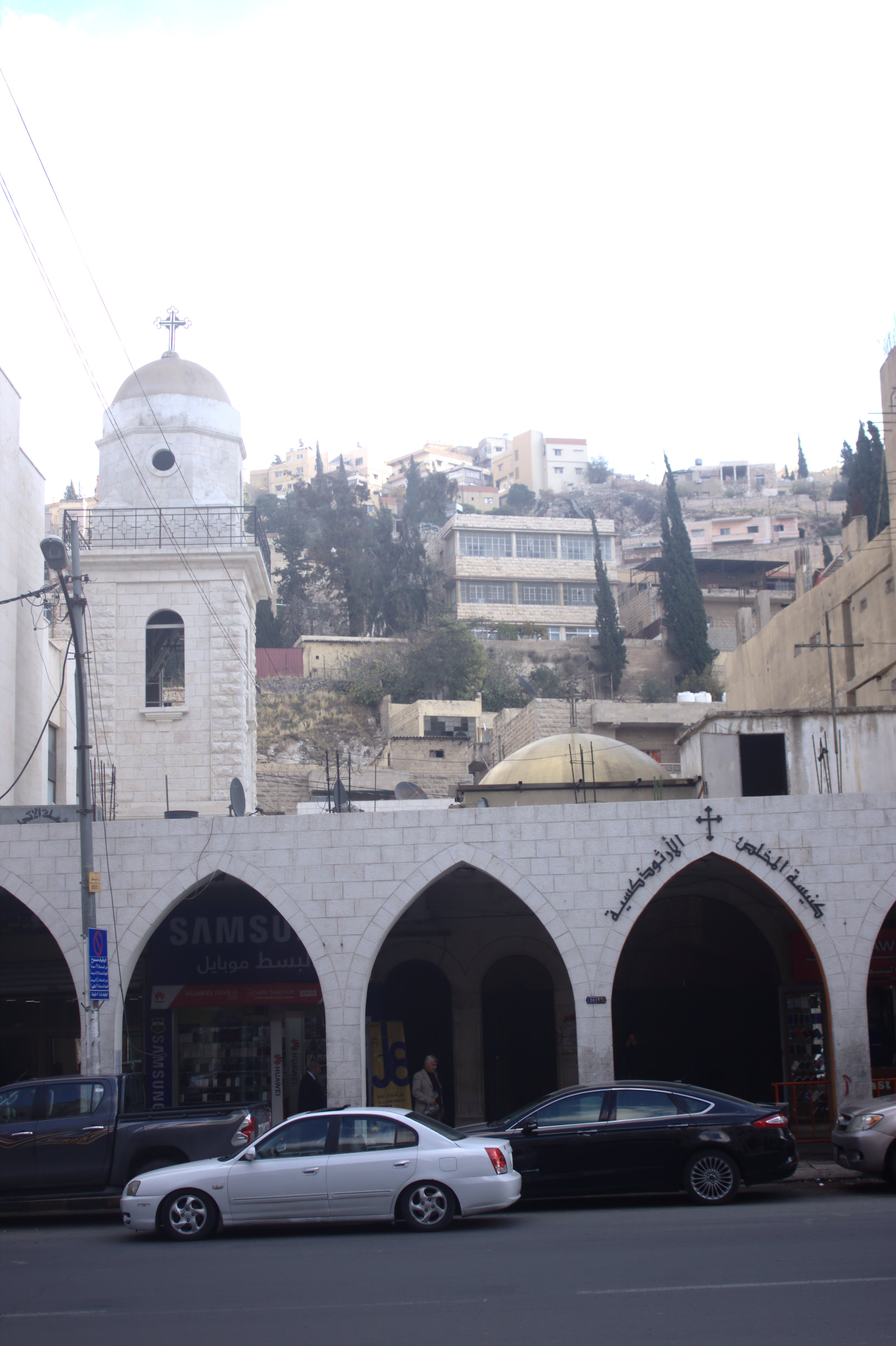 Pravoslavný kostel ve městě Ammán, Jordánsko